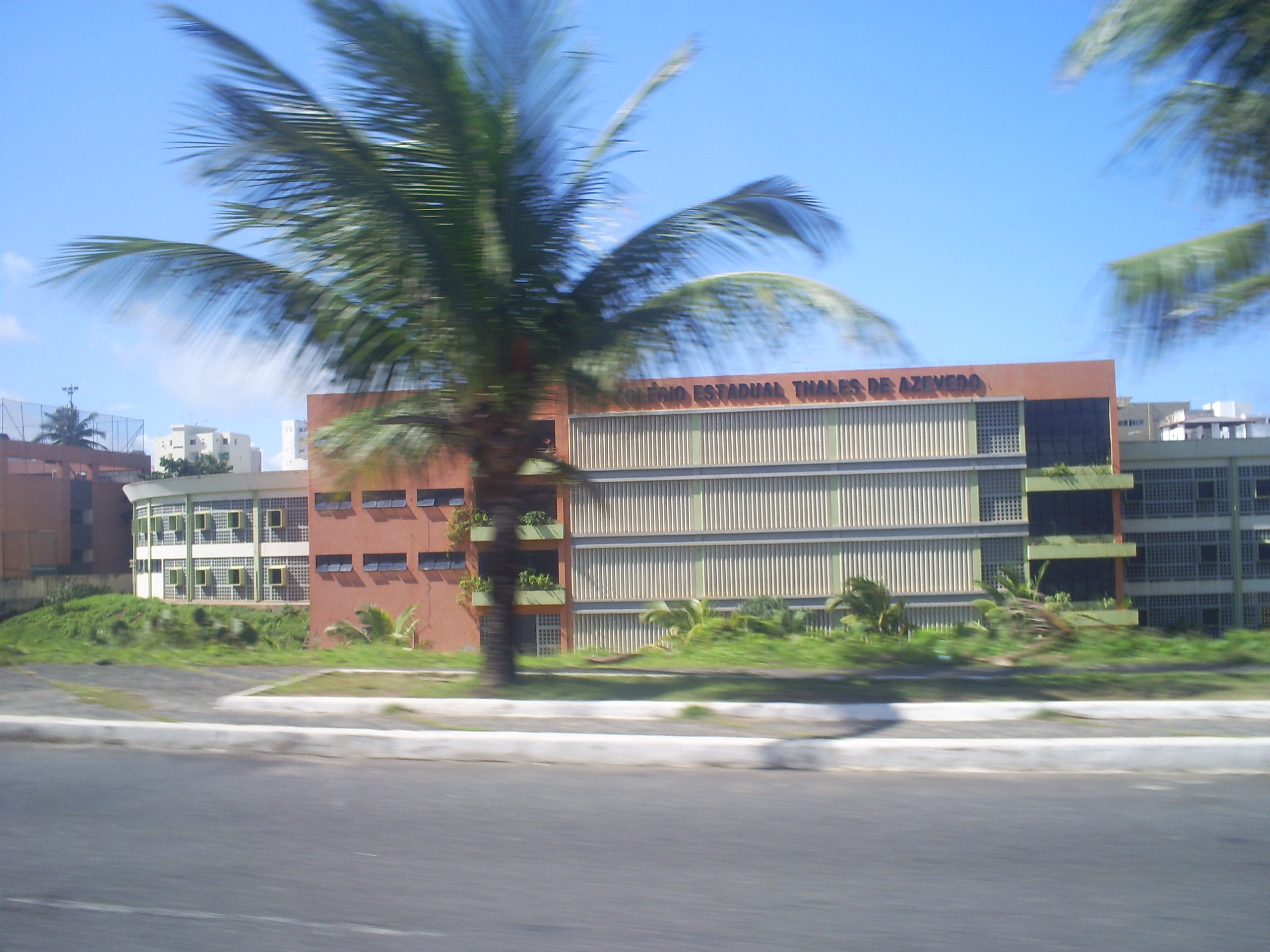 Imagem do Colégio Estadual Thales de Azevedo, em Salvador, Bahia, Brasil.